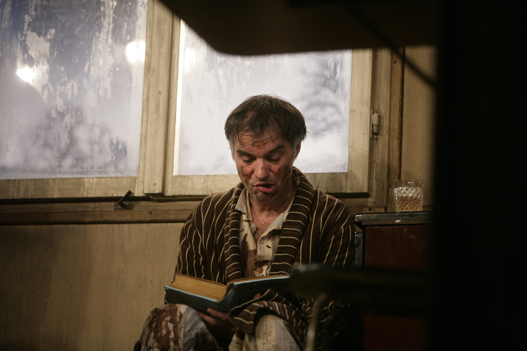 Irvine Welsh: Ucpanej systém, představení v Dejvickém divadle, Bůh (Ivan Trojan).